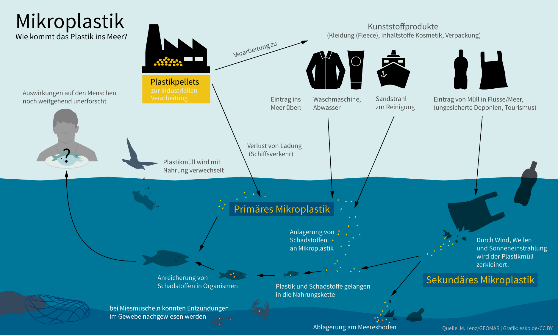 Wie kommt das Plastik ins Meer? Einträge von primären und sekundären Mikroplastik in die Ozeane.